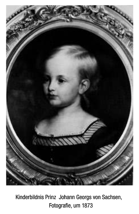 Kinderbildnis Prinz Johann Georgs von Sachsen, Fotografie, um 1873